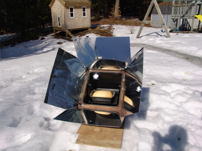 Sunčeva pećnica po zimi